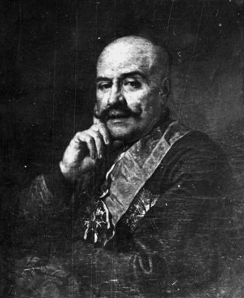 Marcin Grocholski